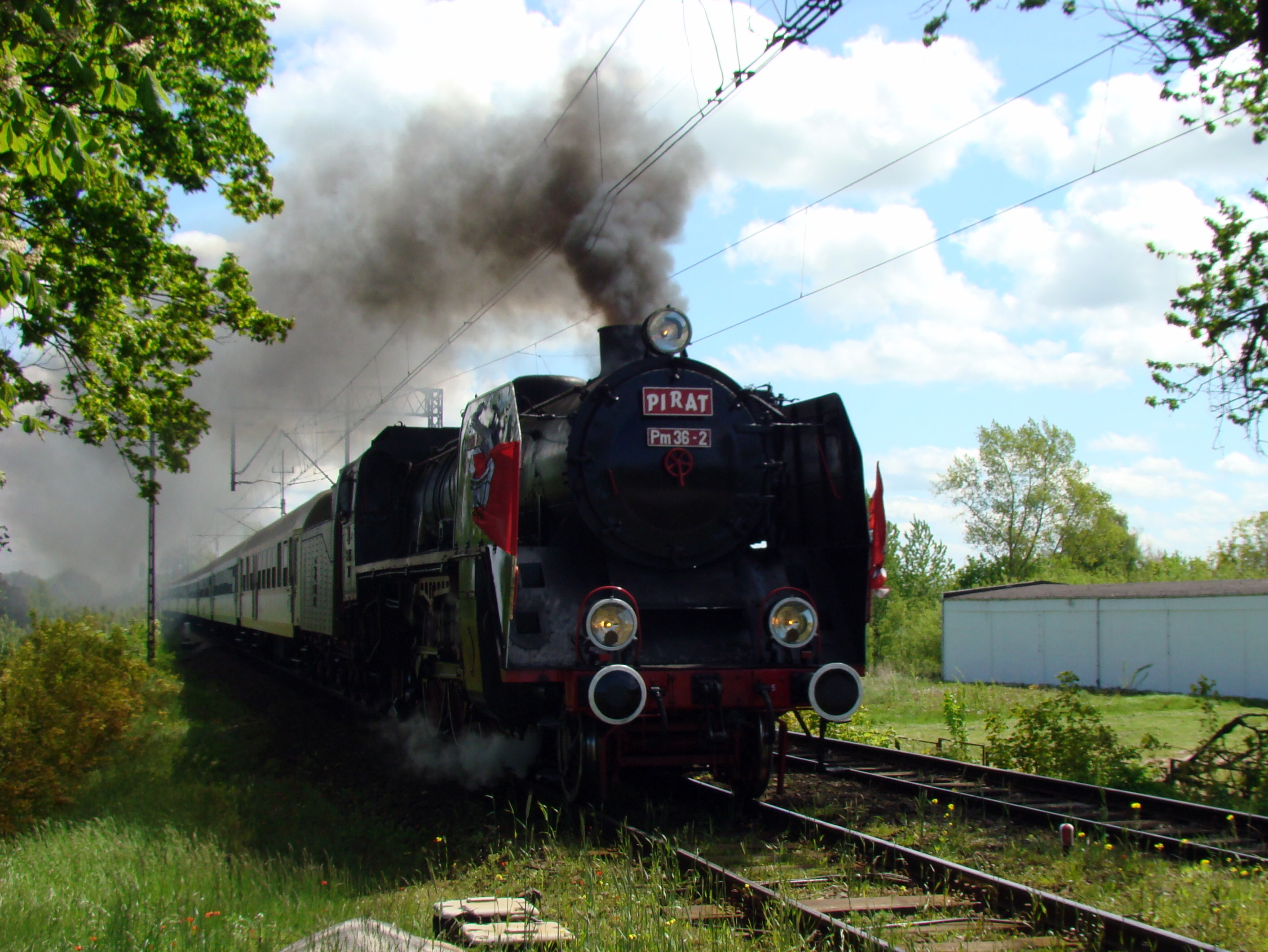 Pociąg Pirat w Dygowie jadący do Kołobrzegu.